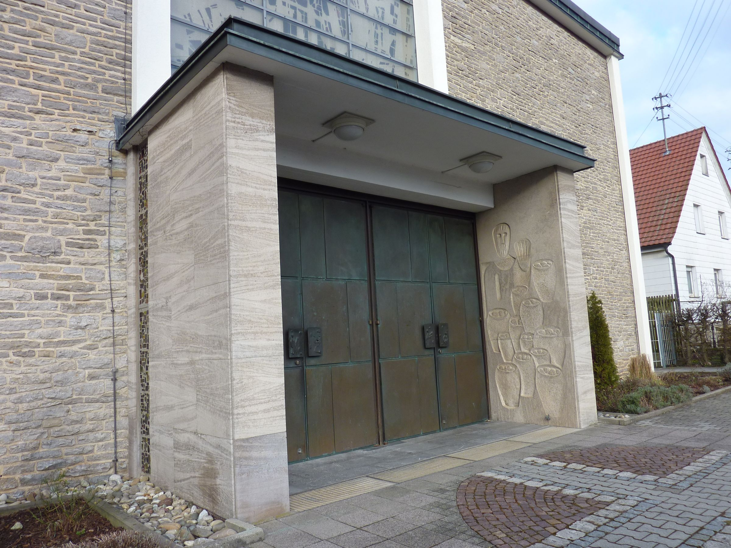 Kircheneingang in Weikersheim